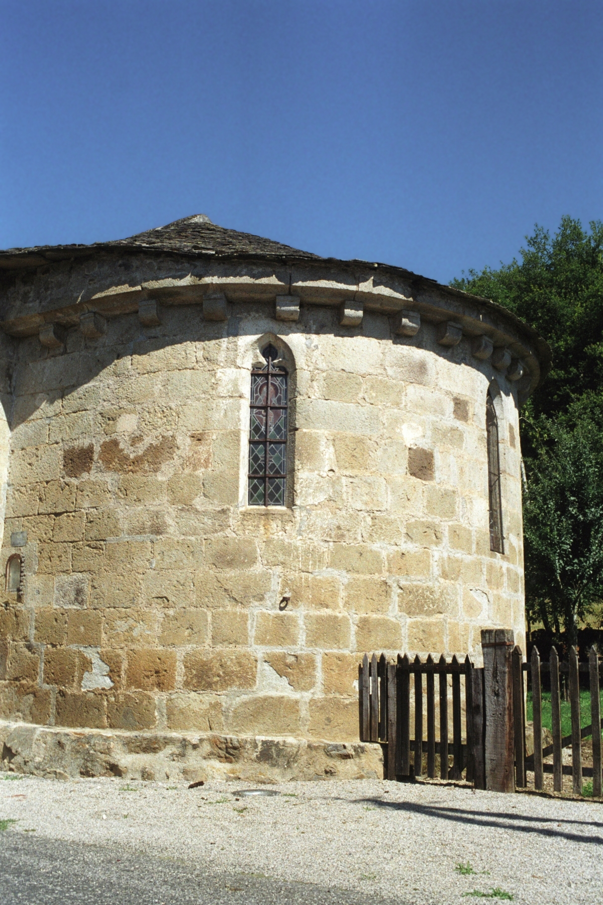 France - Auvergne - Cantal - Église Saint-Ferréol de Salsignac